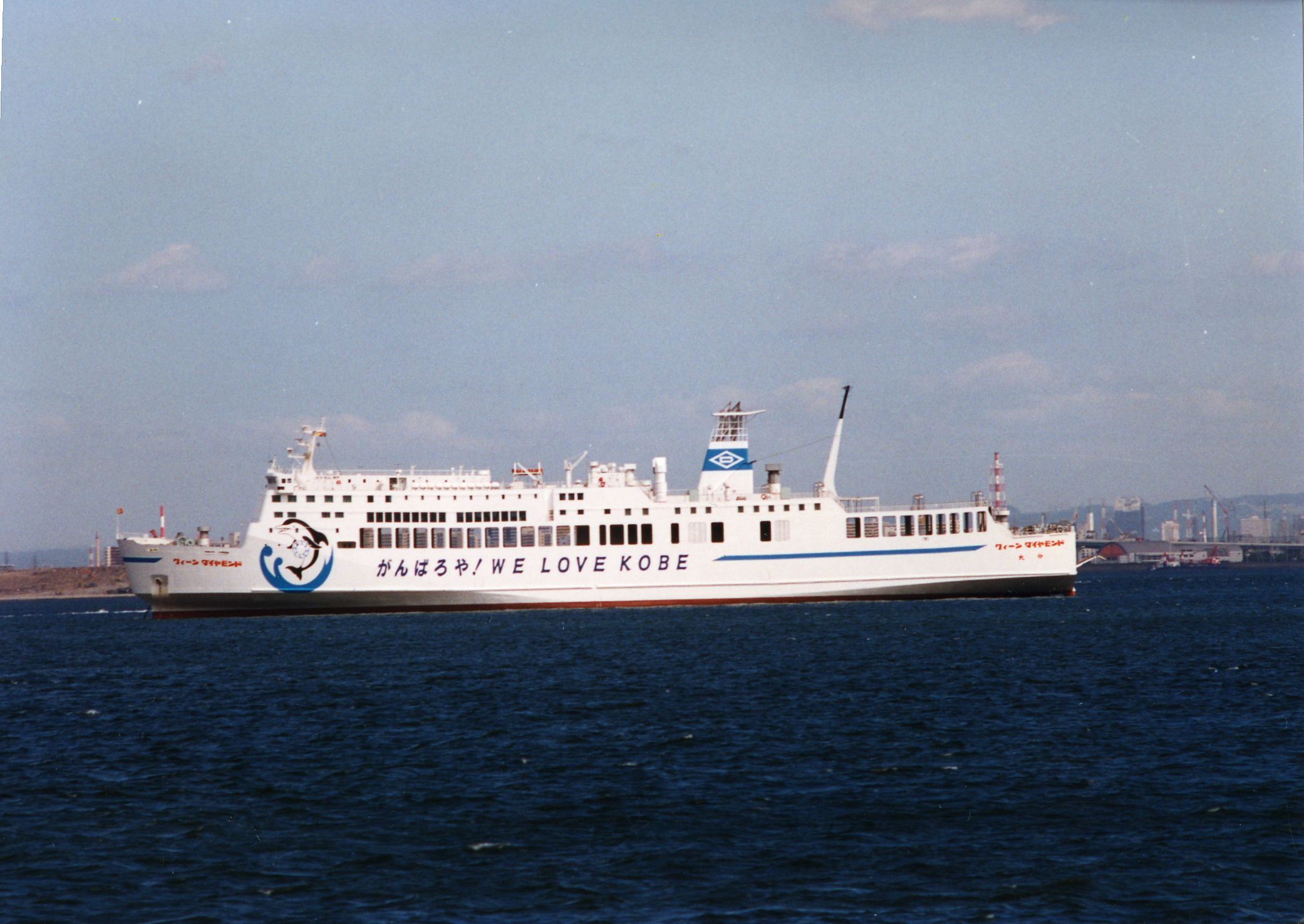 クイーンダイヤモンド（撮影日不明）